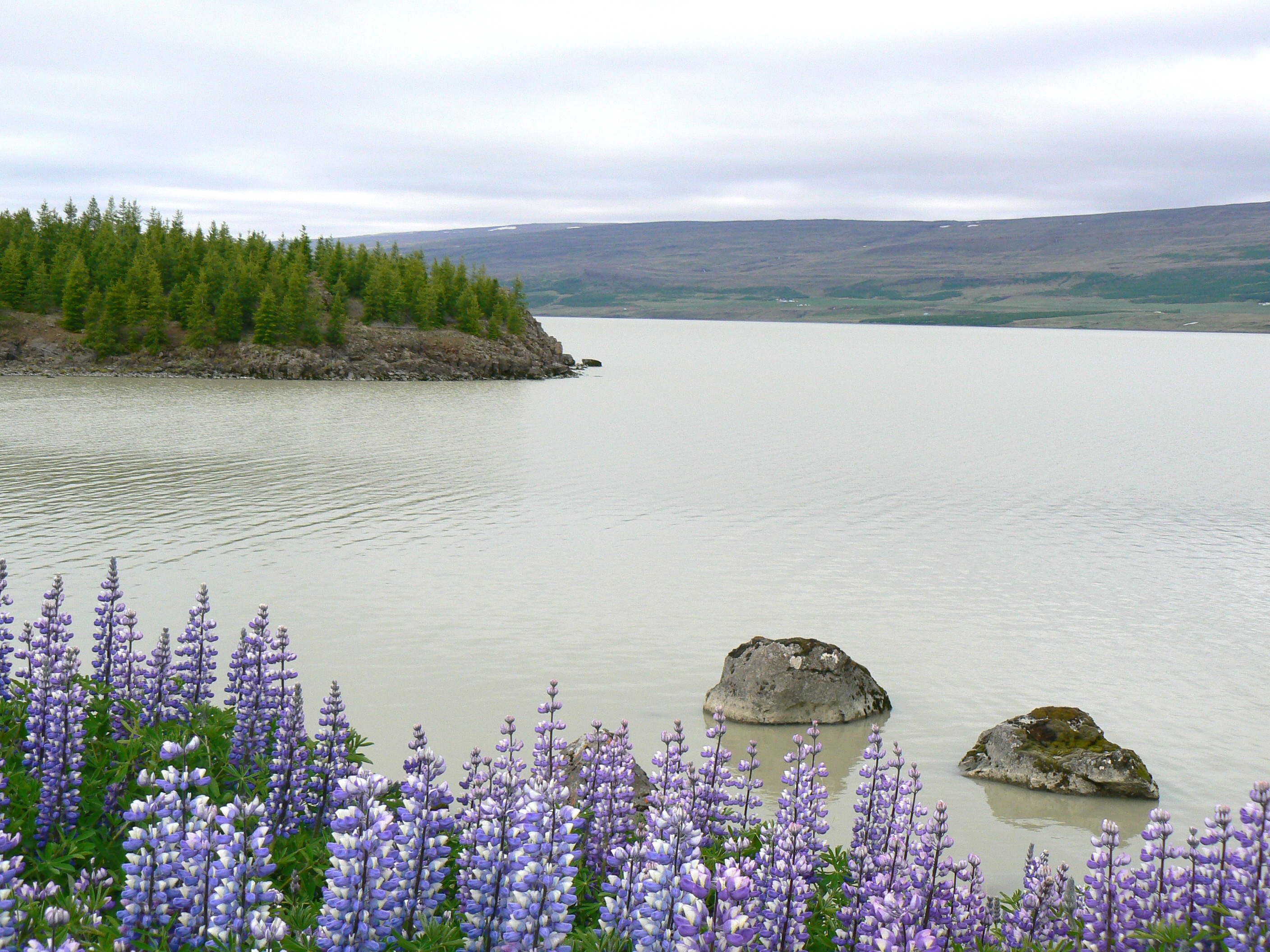 Lagarfljót Iceland